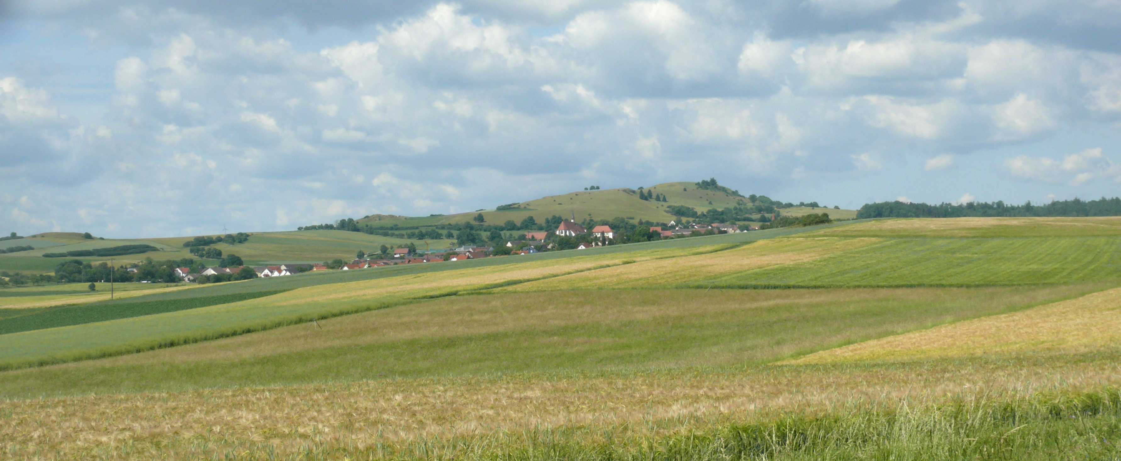 Kirchheim am Ries mit dem Blasenberg (Blasienberg) im Hintergrund